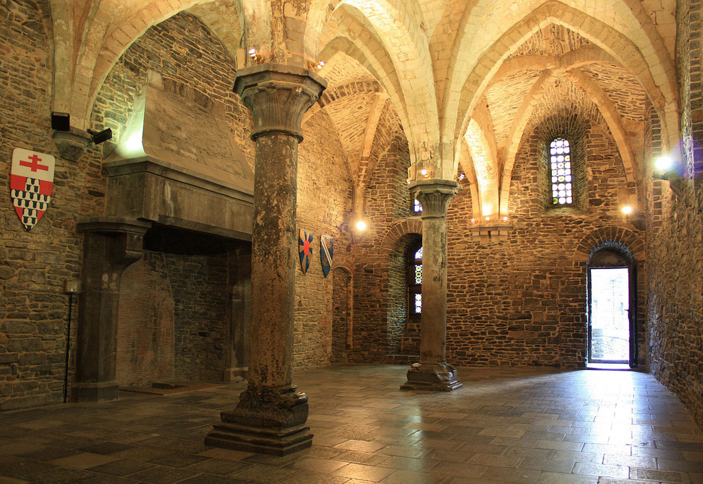 Grafelijk hof in het Gravensteen te Gent